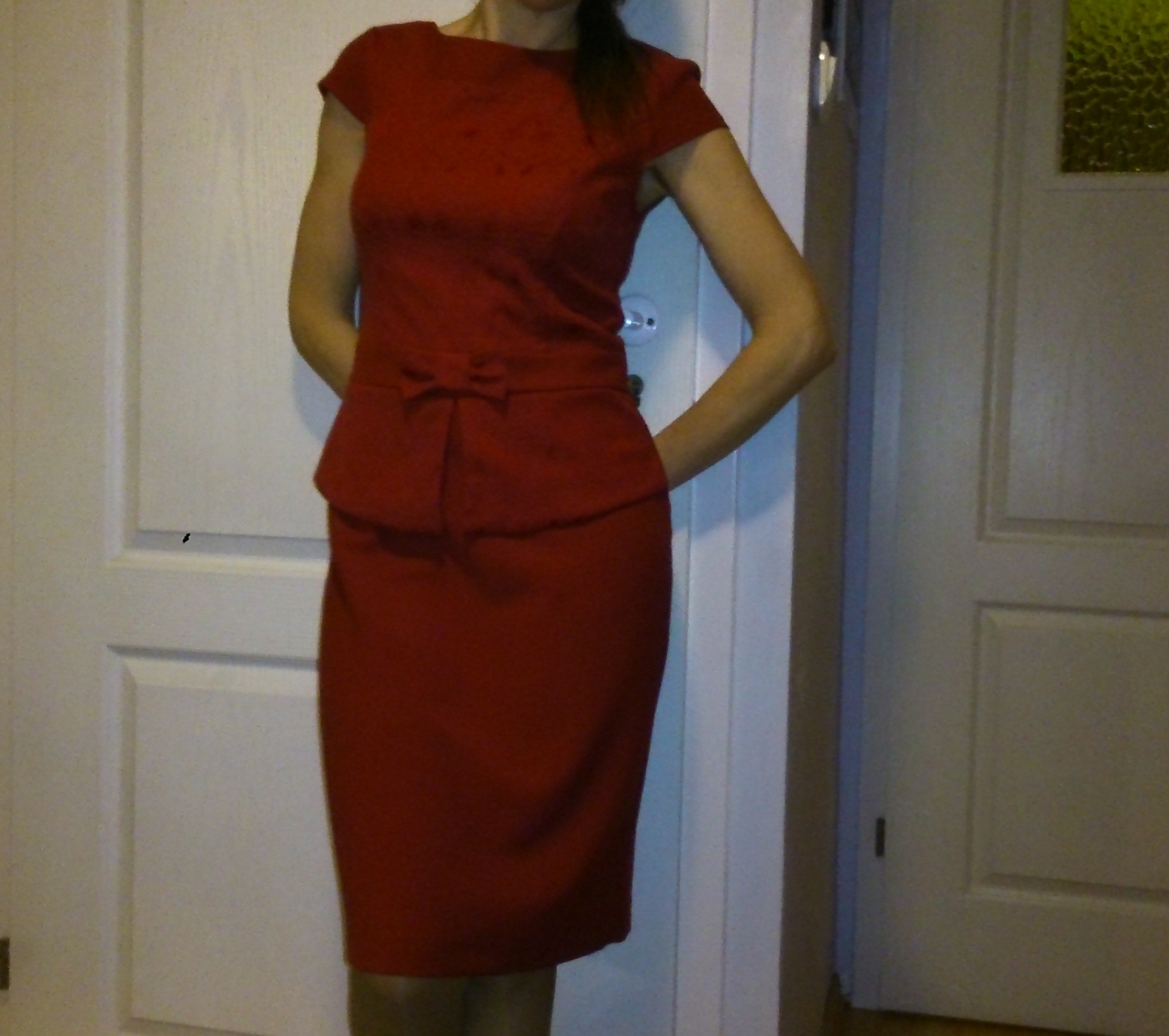 Sukienka z baskinką